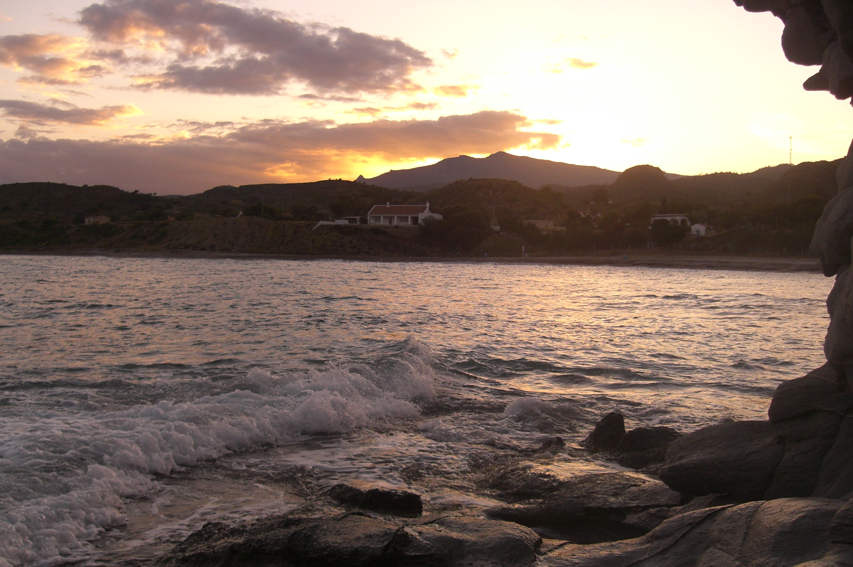 Cala El Charco/El Xarcó en Villajoyosa/La Vila Joiosa (Alicante)